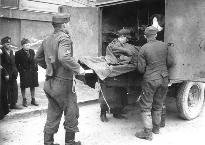 Ungarn, Richtung Plattensee etwa 15.-20. März 1945 links: Angehörige der ROA